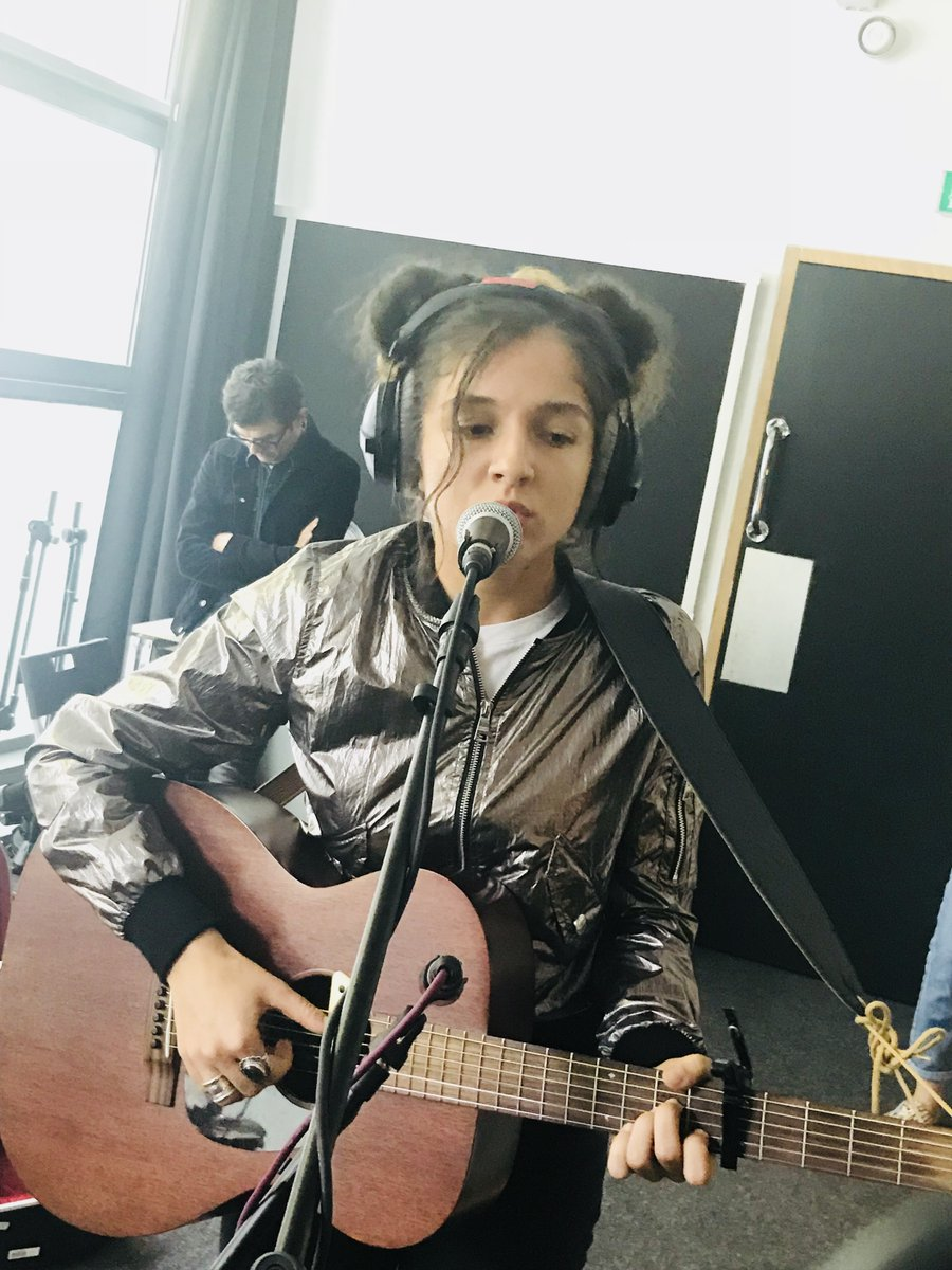 Naya en septembre 2018 à Paris